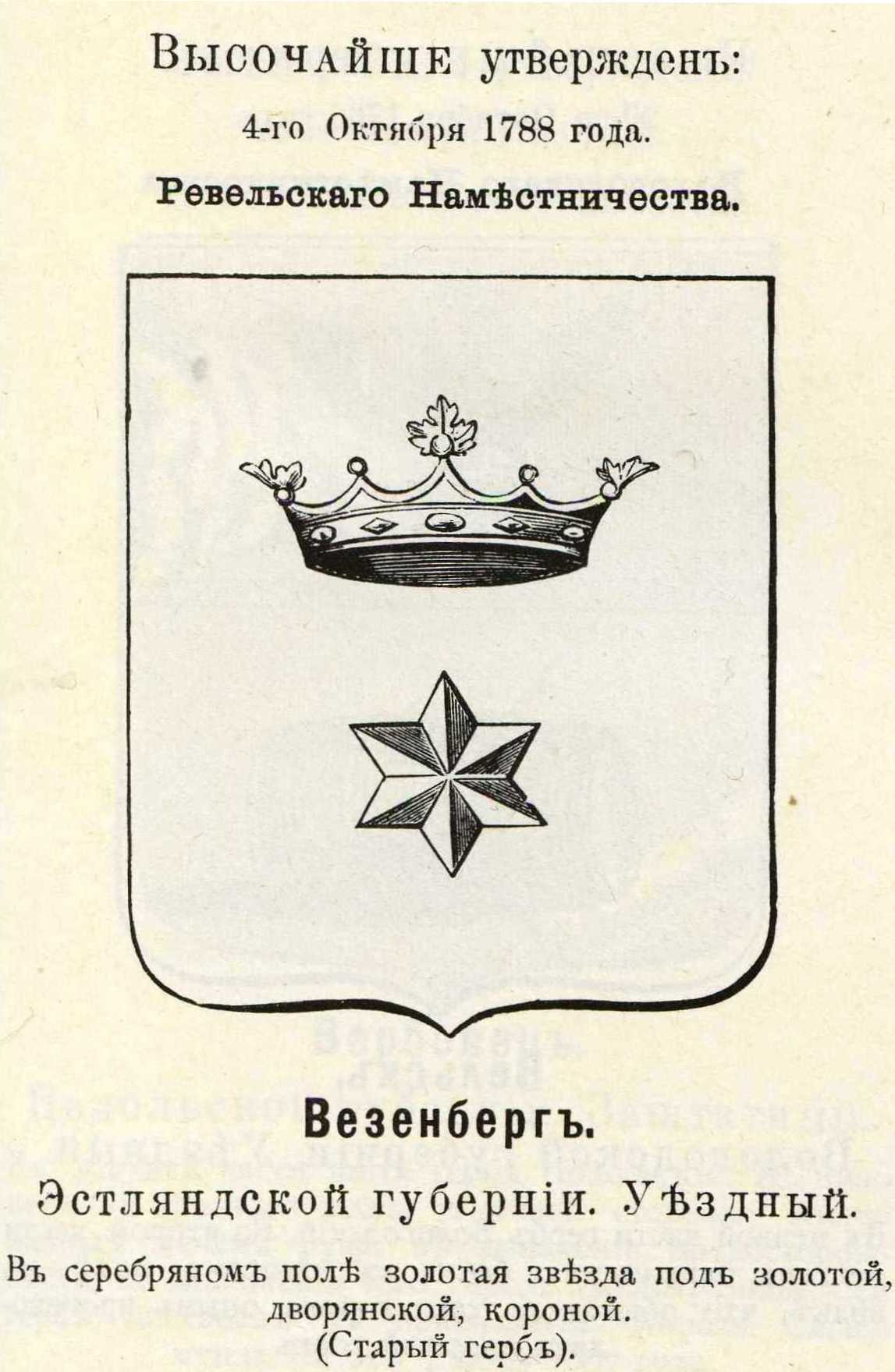 Official Russian Empire coat of arms Vezenberg. Герб Российской Империи уездного города Везенберг Эстляндской губернии (в 1788 - Ревельского наместничества) с официальным описанием в Гербовнике Винклера.